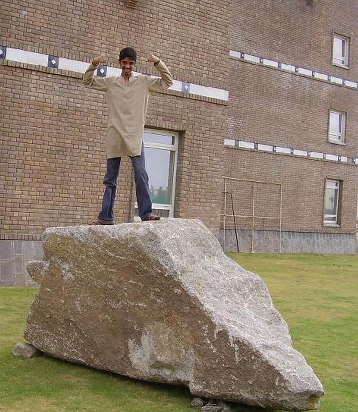 A guy in Punjab wearing jeans & traditional 'Kurta'.